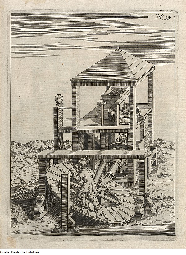 Original image description from the Deutsche Fotothek Mechanik & Mühle & Mahlwerk & Tretmühle